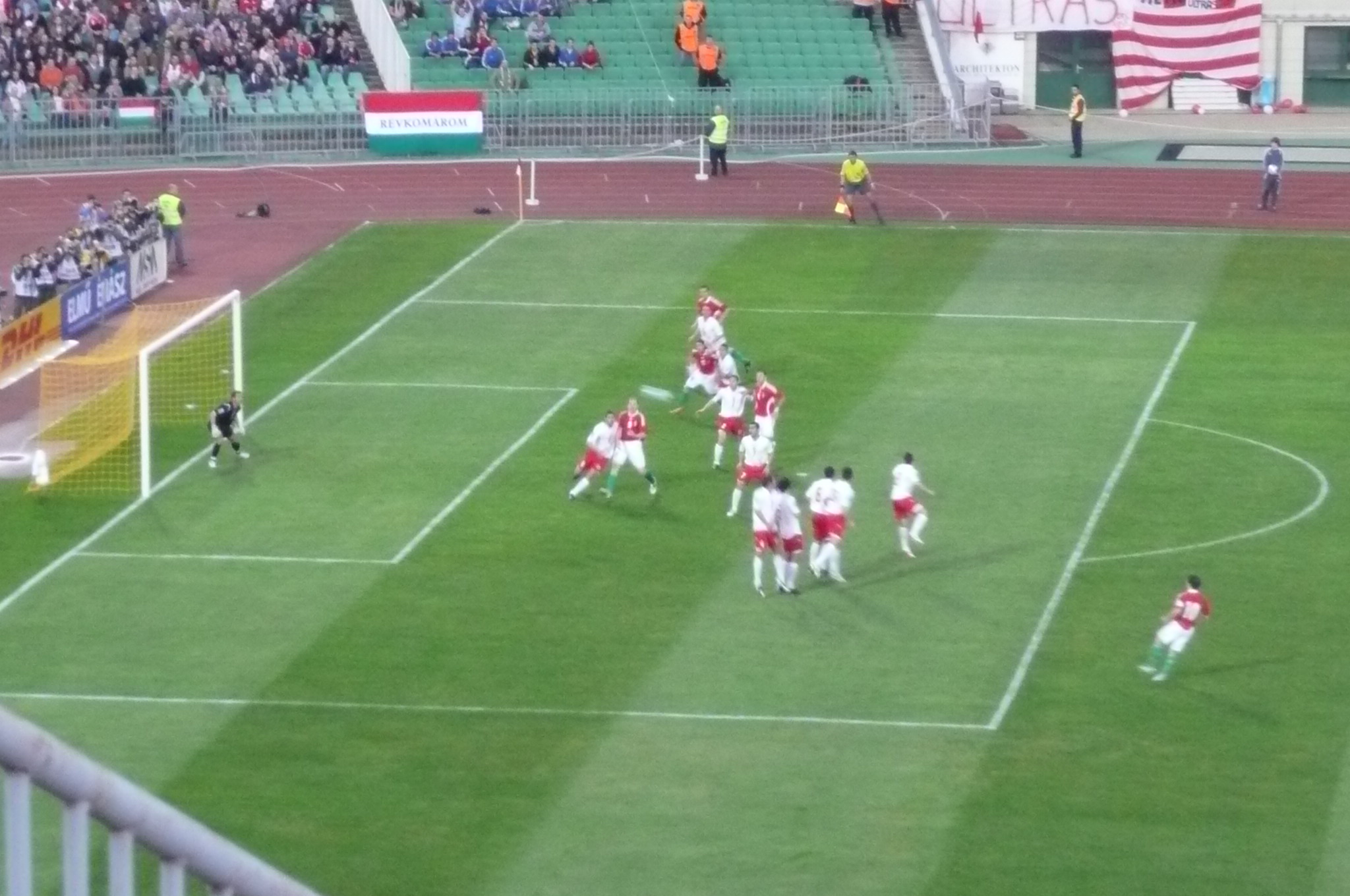 Hajnal Tamás Málta elleni gólja (Budapest, Puskás Ferenc Stadion)